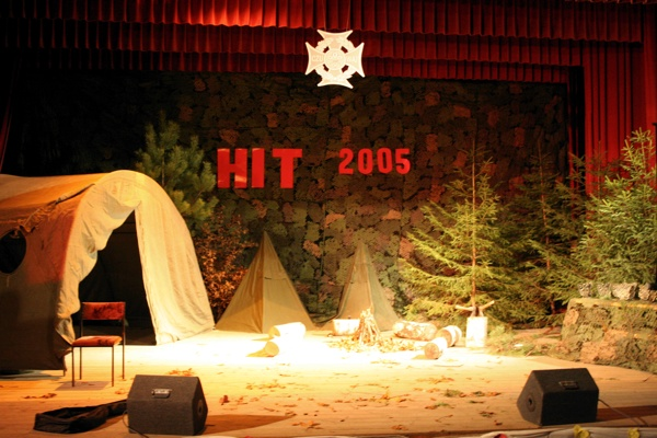 Scena festiwalu HiT 2005